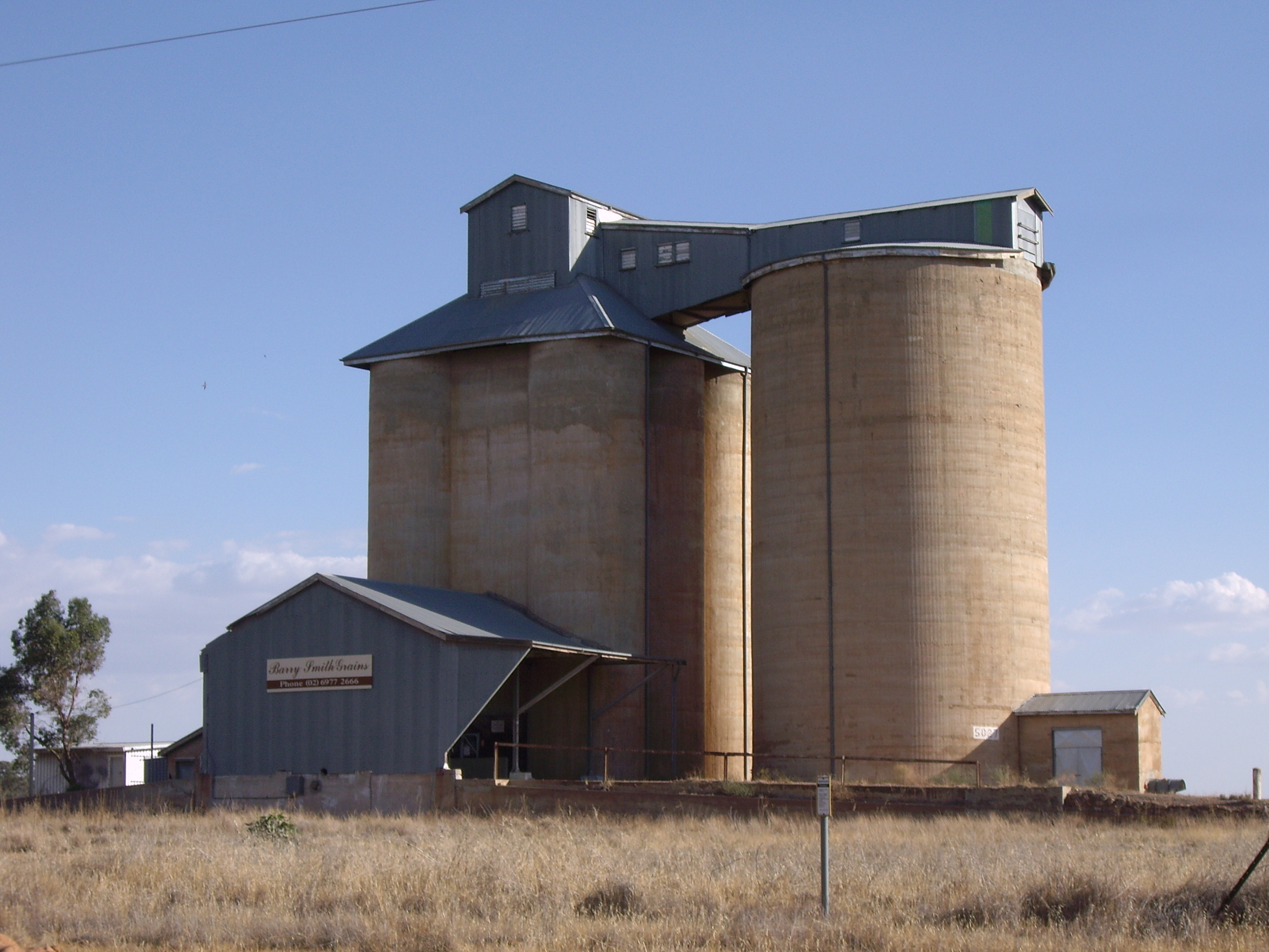 Silos at Combaning